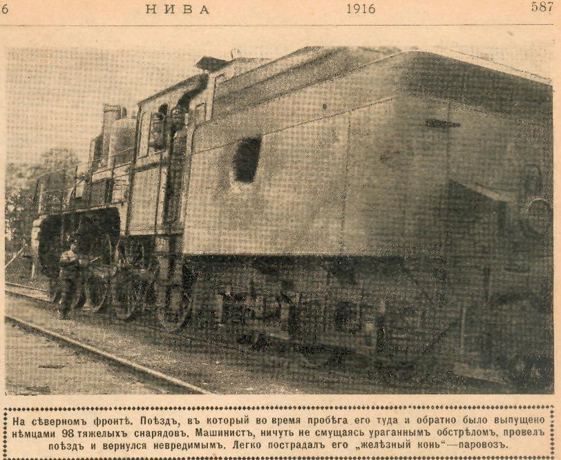 Русский паровоз К формулы 2-3-0 Северного русского фронта, пробитый германским снарядом. 1916. По поезду было выпущено 98 снярядов.